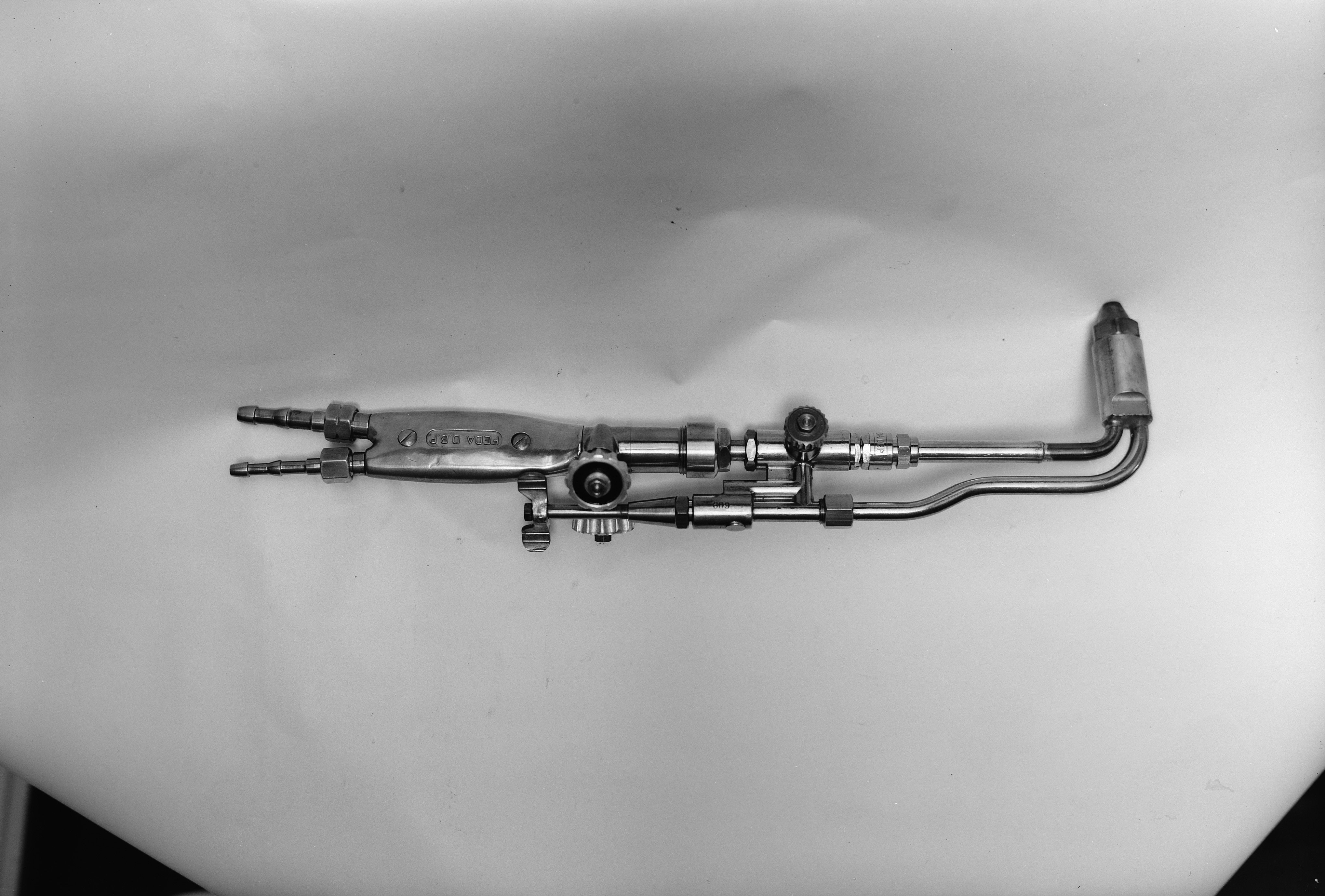 Collectie / Archief : Fotocollectie Arbeidsinspectie Reportage / Serie : [ onbekend ] Beschrijving : 10x15 Lage druk snijbrander fabrikaat Feda (zie rapport nr. 164) Datum : 8 november 1952 Trefwoorden : snijbranders Fotograaf : [onbekend] Auteursrechthebbende : Nationaal Archief Materiaalsoort : Glasnegatief Nummer archiefinventaris : bekijk toegang 2.24.03 Inventarisnummer : 2271 Bestanddeelnummer : 256-0994